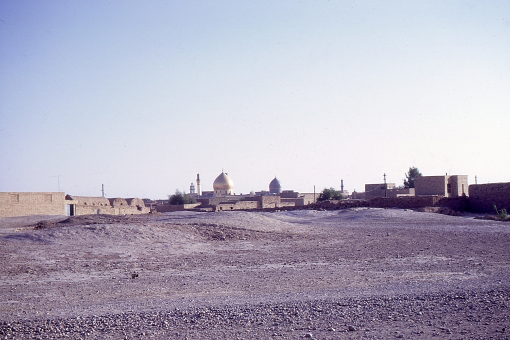 Samarra. Vue générale sur les dômes en 1970